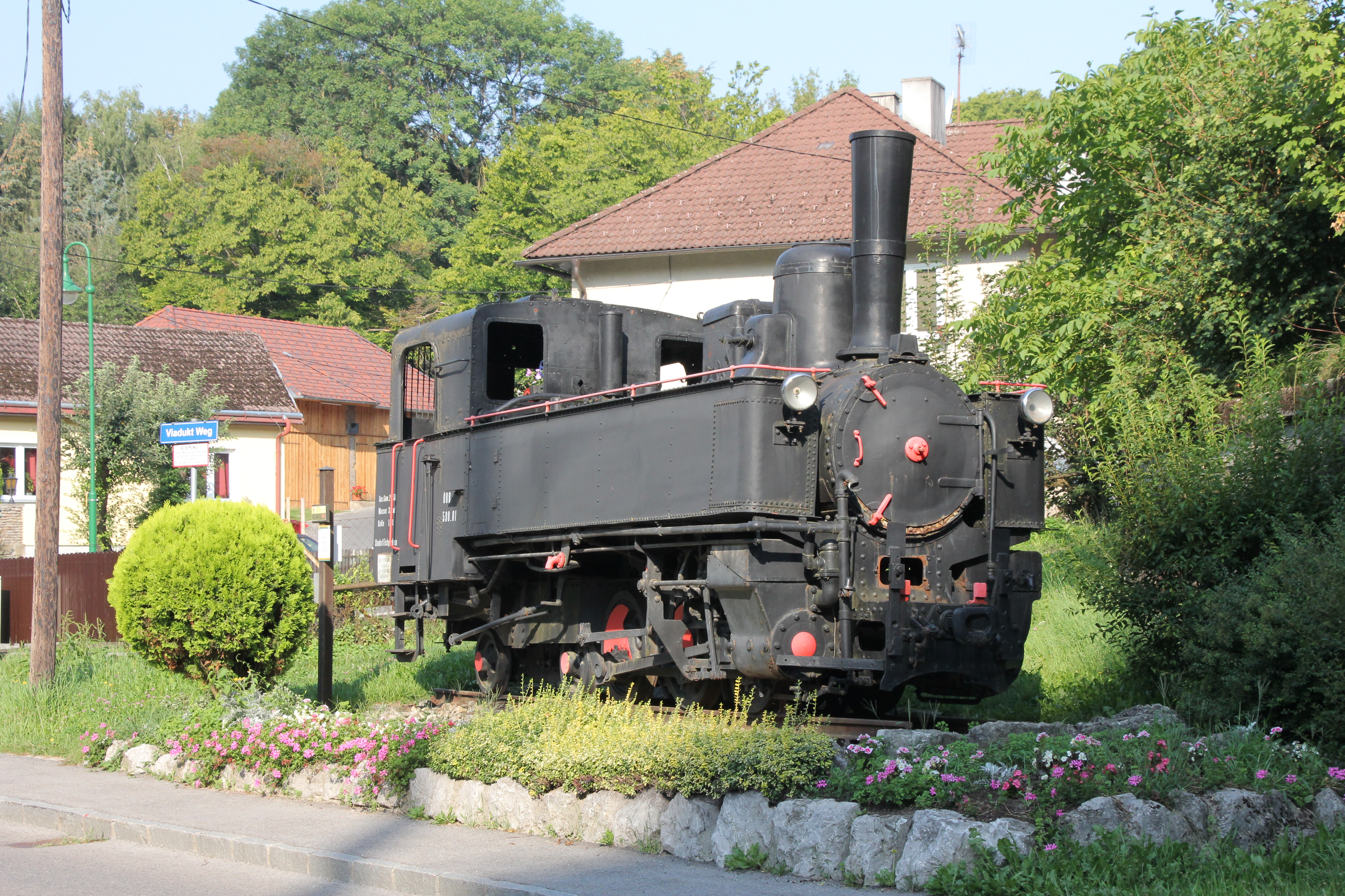 Denkmallokomotive in Eichgraben